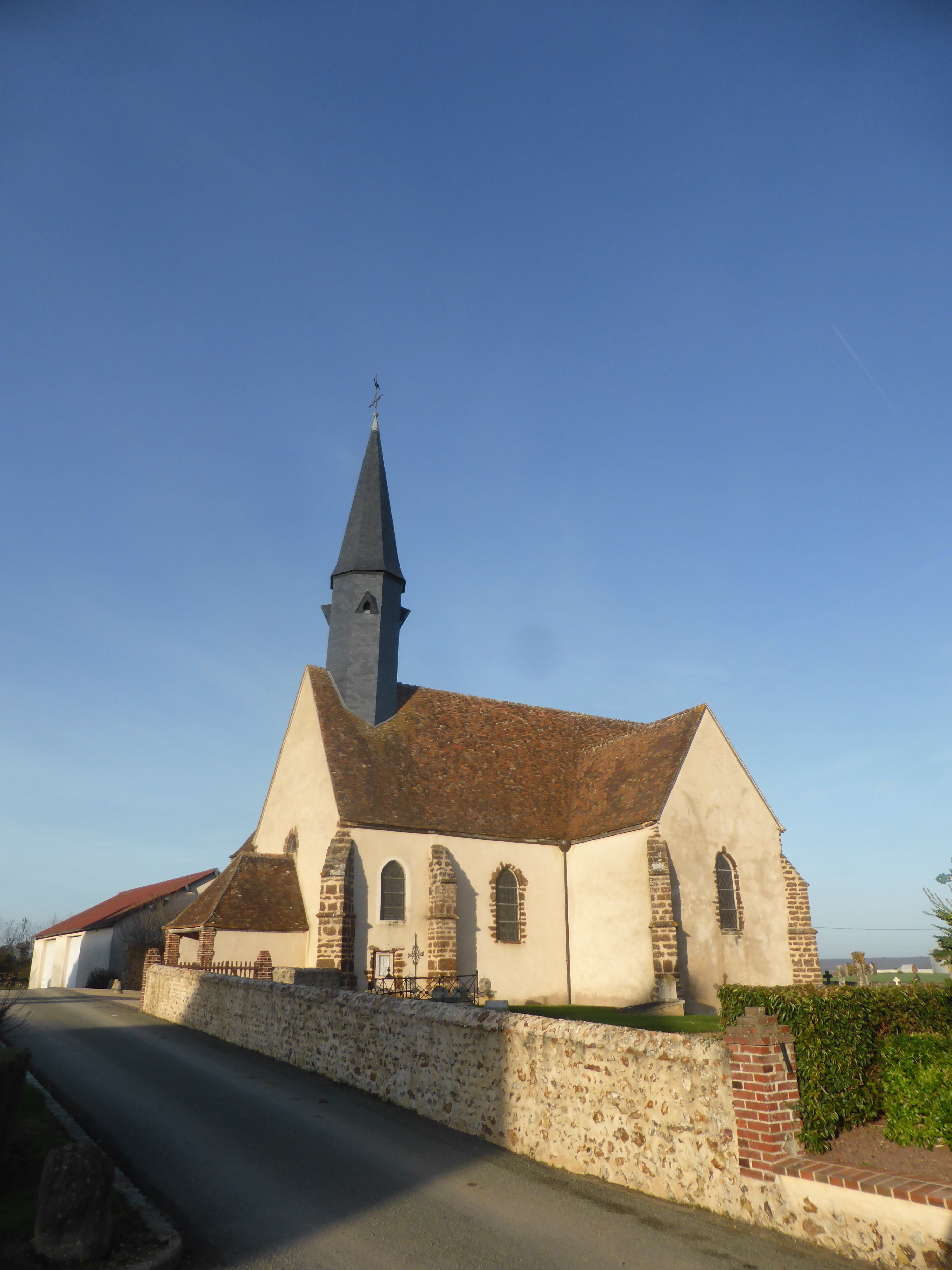 Église Saint-Léonard de Meaucé, en Eure-et-Loir.